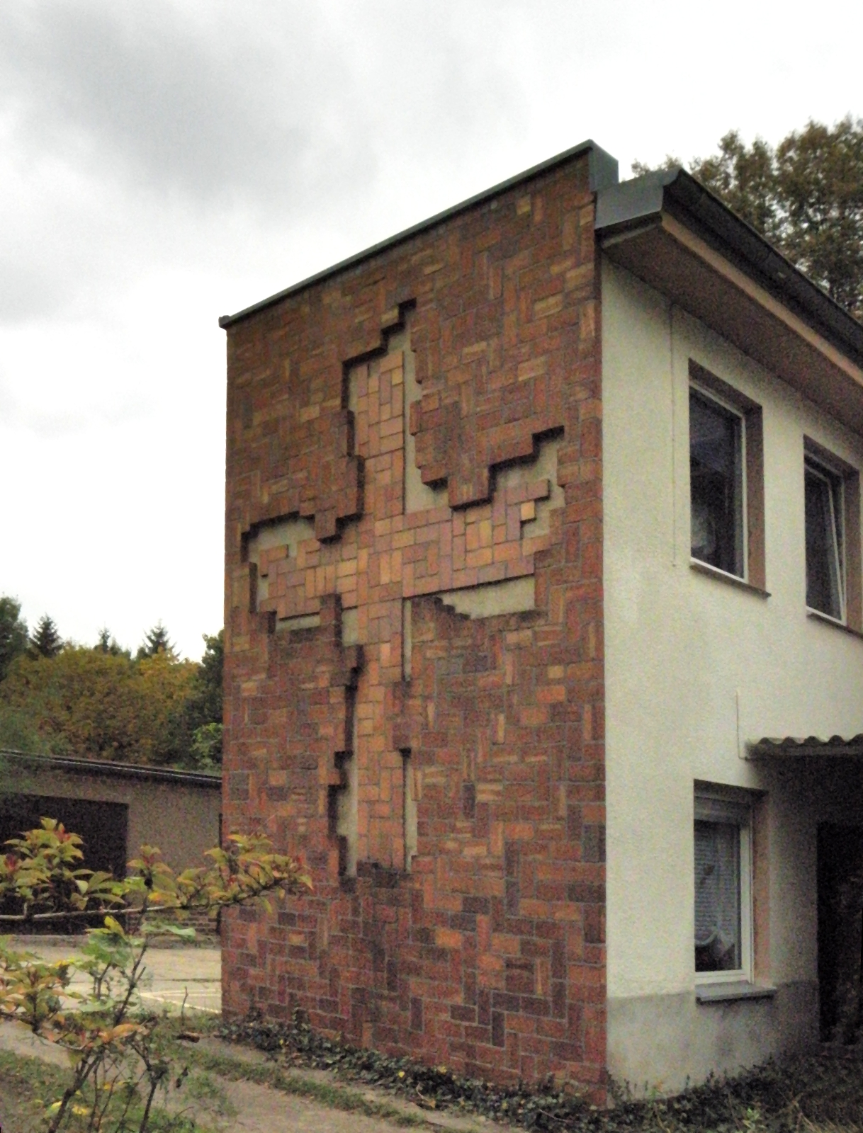 Kirche St. Peter und Paul, Eberswalde. Pfarrhaus